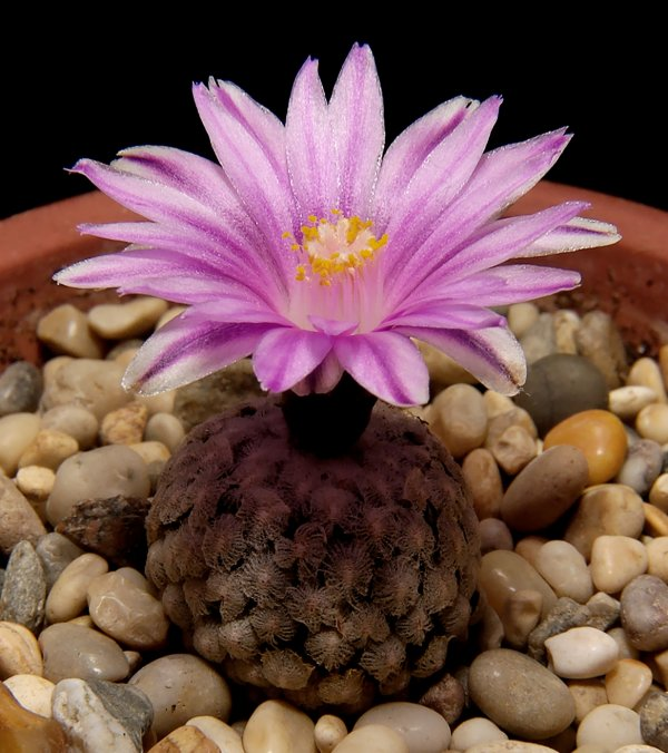 Turbinicarpus valdezianus